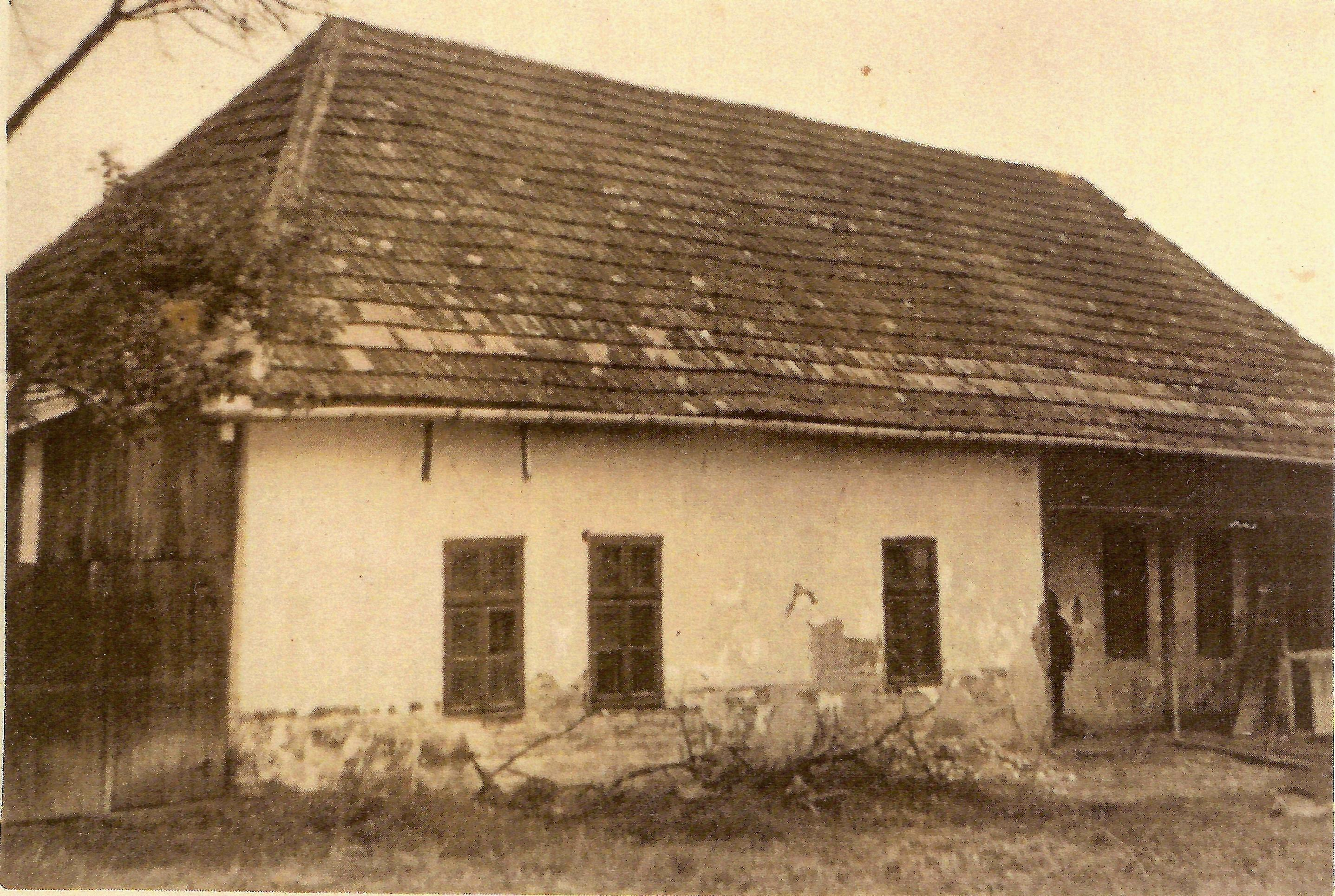 Şcoala veche din Marin, judeţul Sălaj, România.